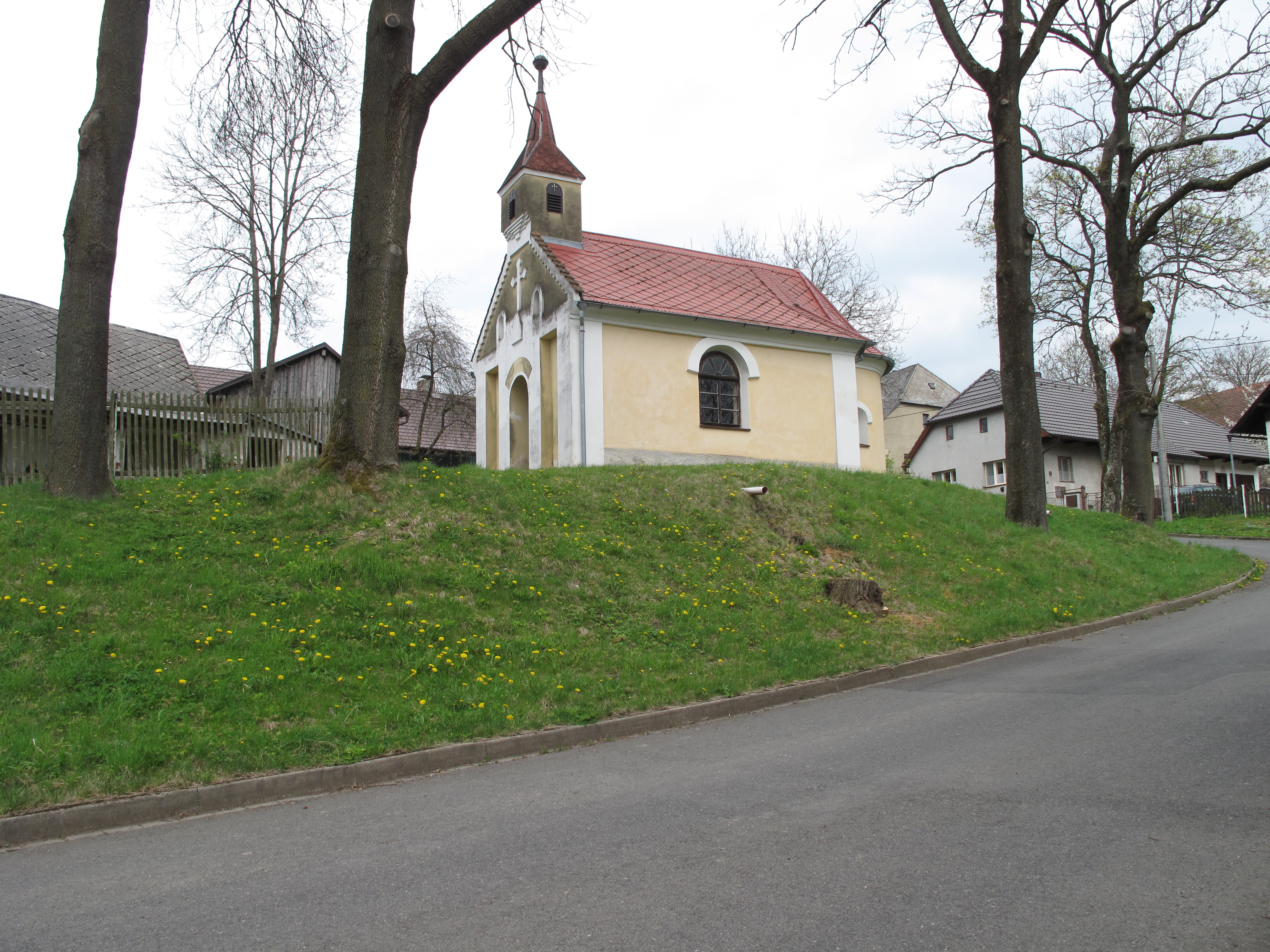 Milence. Okres Klatovy, Česká republika.